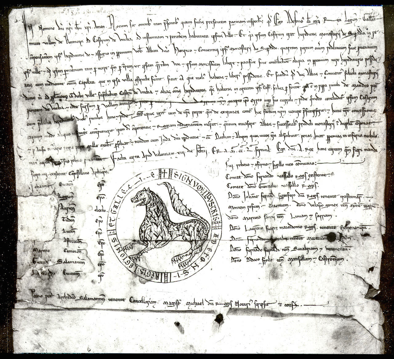 Privilexio do mosteiro de Sobrado outorgado por Afonso VIII, rei de Galiza e León (1188-1230), para o traslado poboacional de Betanzos ó castro de Untia.